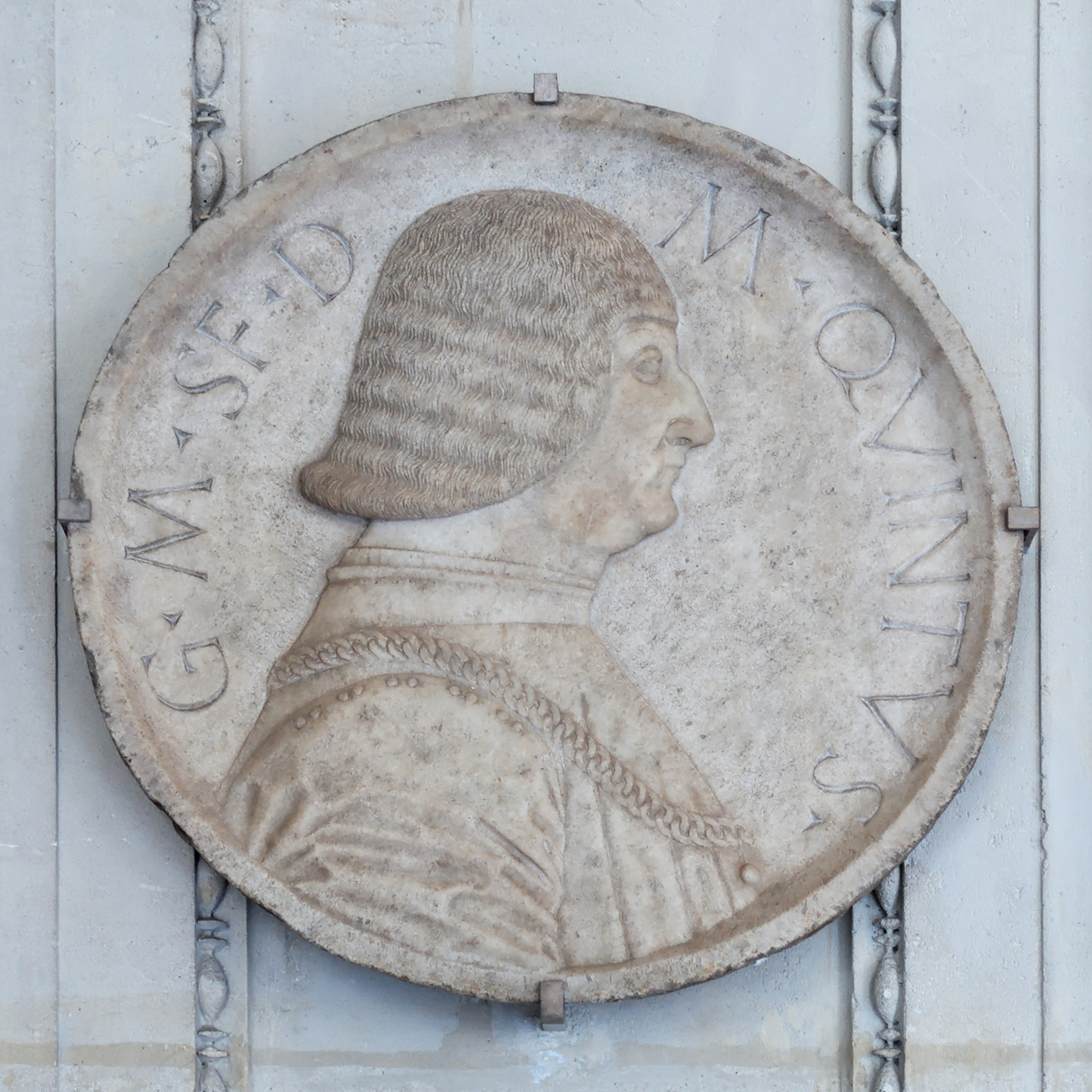 Portrait of Galeazzo Maria Sforza (1444–1476)